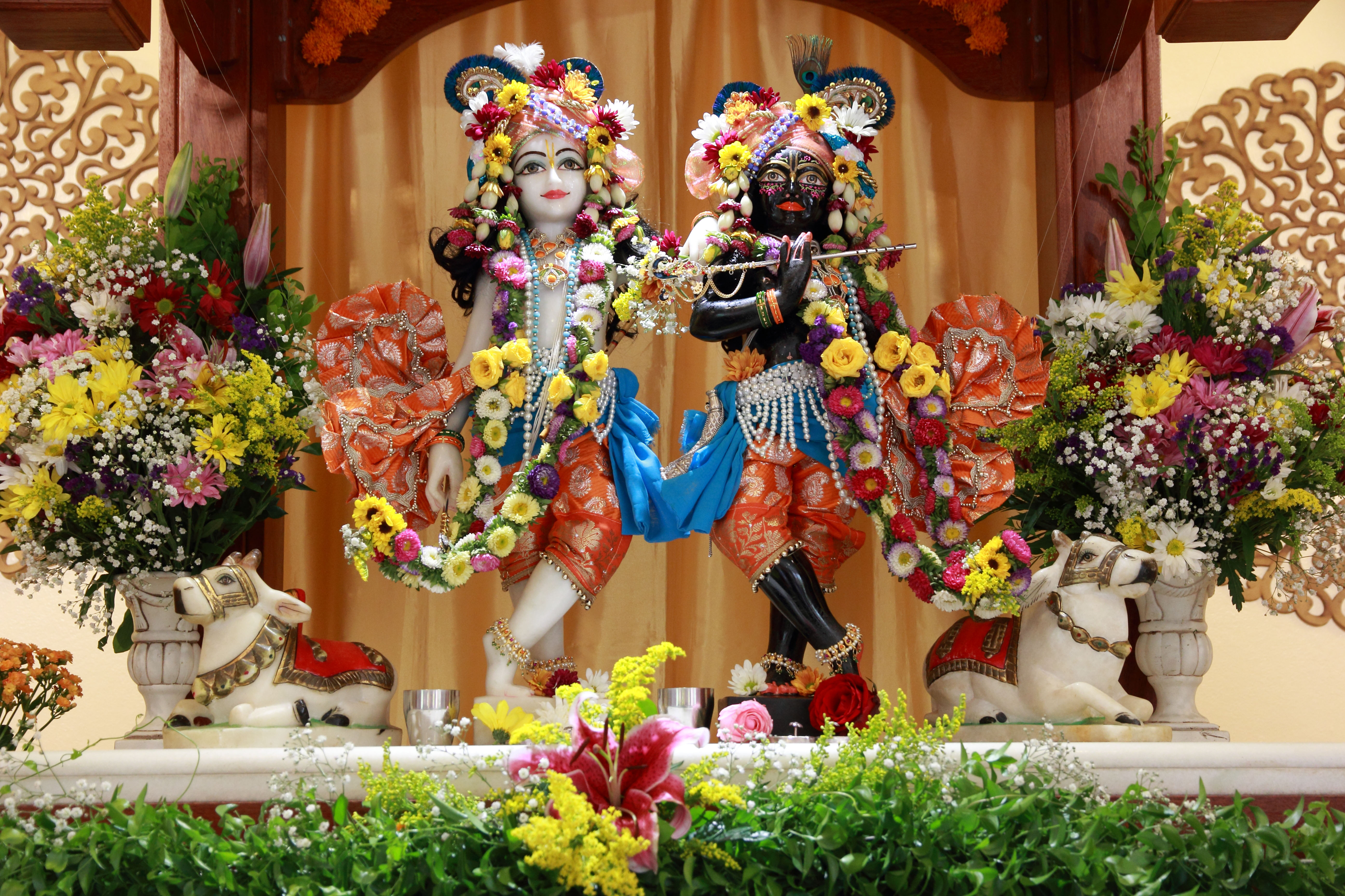 Deidades de mármore de Krishna e Balarama instaladas em Vrajabhumi, Teresópolis.